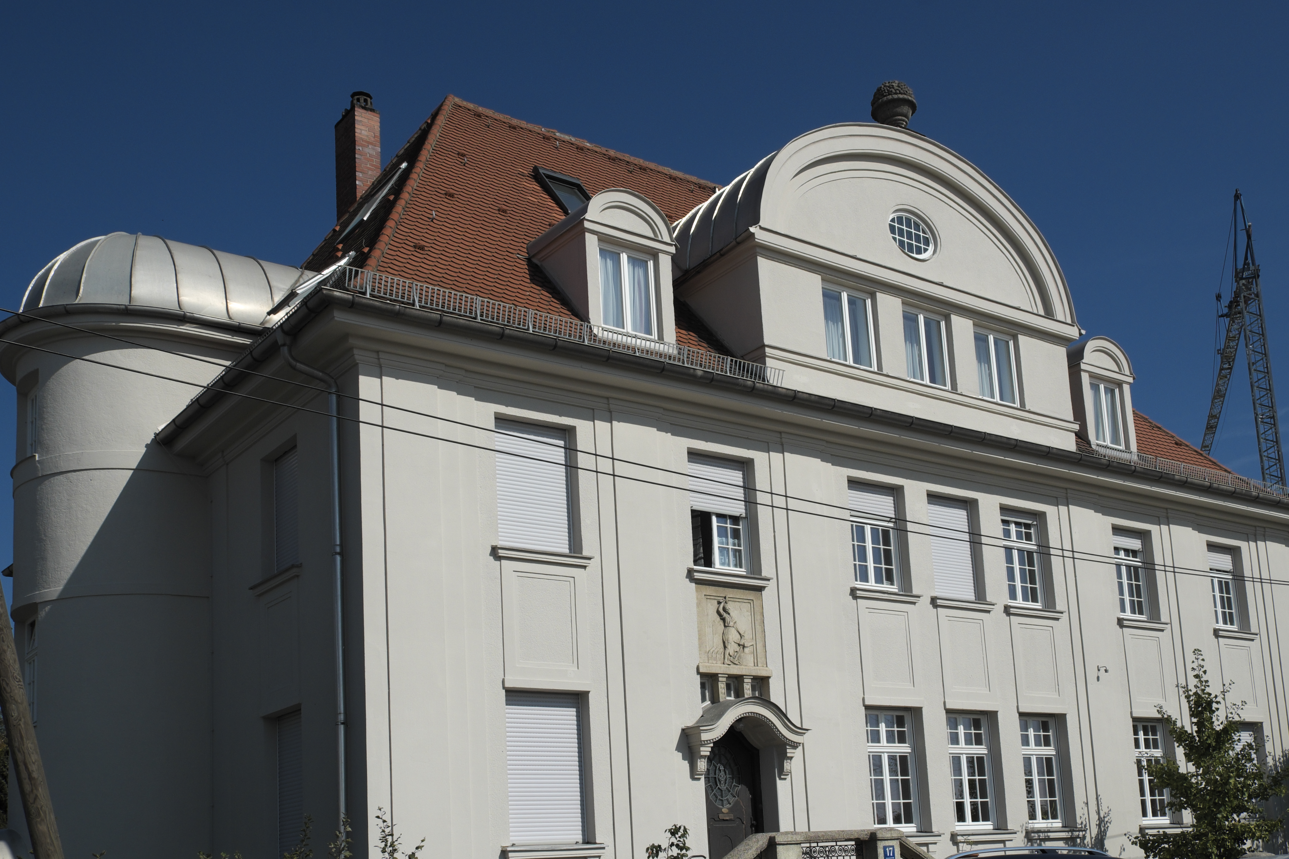 Villa in der Hildachstraße 17 in Pasing im Stadtbezirk Pasing-Obermenzing in München (Bayern/Deutschland), 1913/14 von den Gebrüdern Ott errichtet